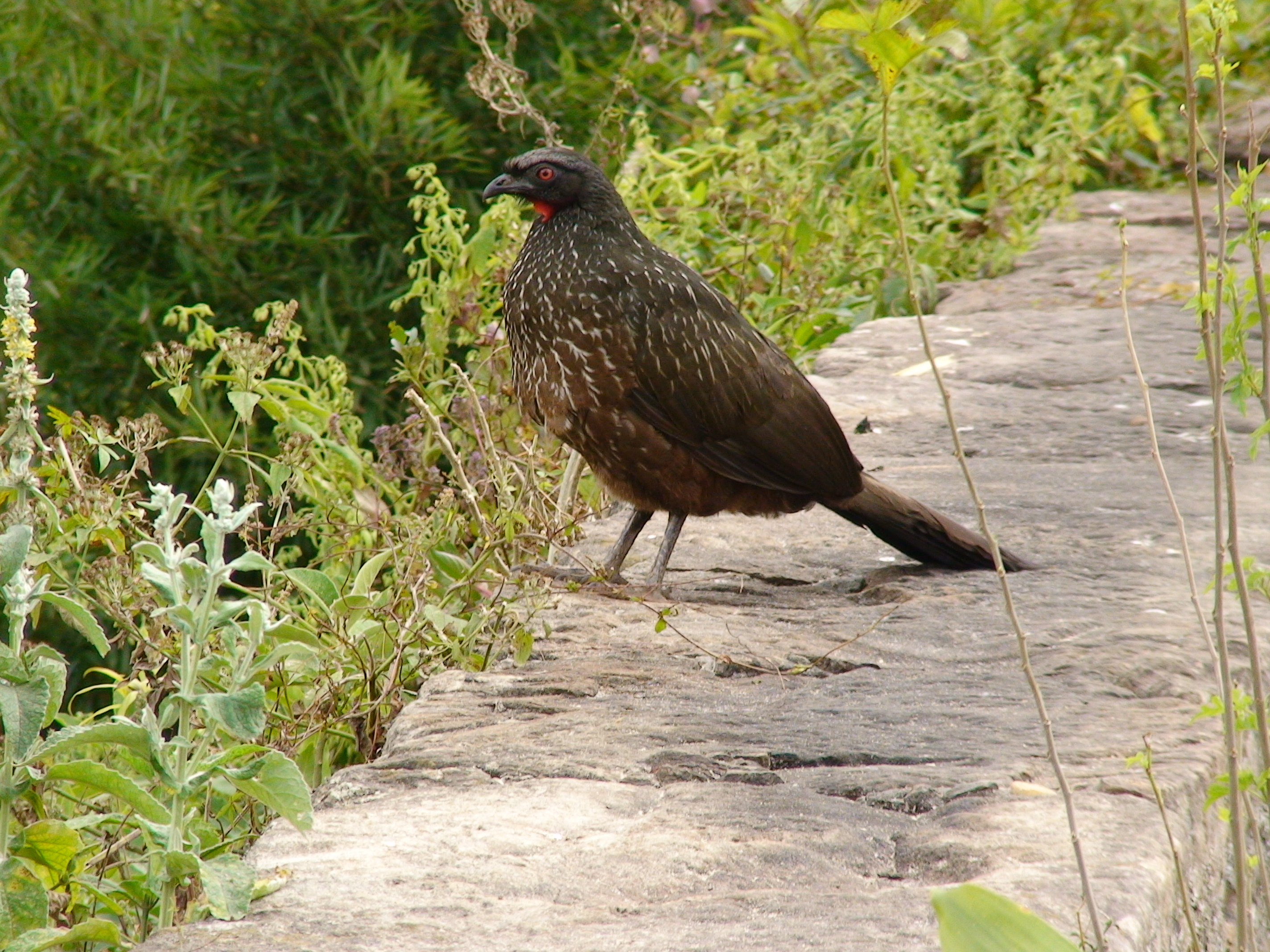 Malhela Jakuo Penelope obscura en Karasa